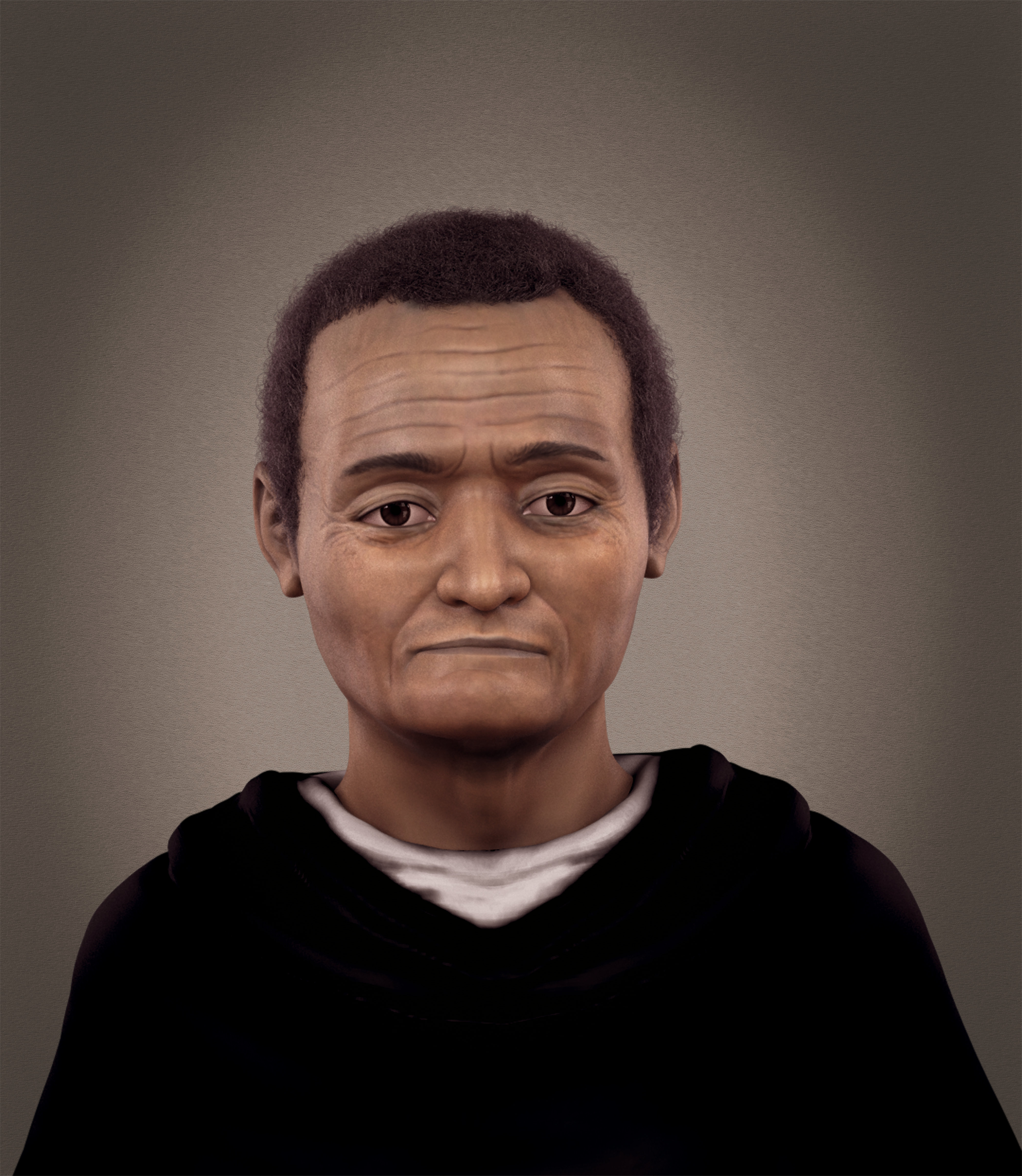 Reconstrução facial 3D digital de São Martinho de Porres. Reconstrução (modelagem) 3D: Cícero Moraes Consultoria Forense: Dr. Paulo Miamoto Entidades envolvidas: Ebrafol - Equipe Brasileira de Antropologia Forense e Odontologia Legal, Convento Santo Domingo, Faculdade FASIPE, Paróquia Santa Rosa de Lima, Spolfoc - Sociedad Peruana de Antropologia Forense e Odontologia Legal, Universidad inca Garsilaso de la Vega, Universidad San Martín de Porres